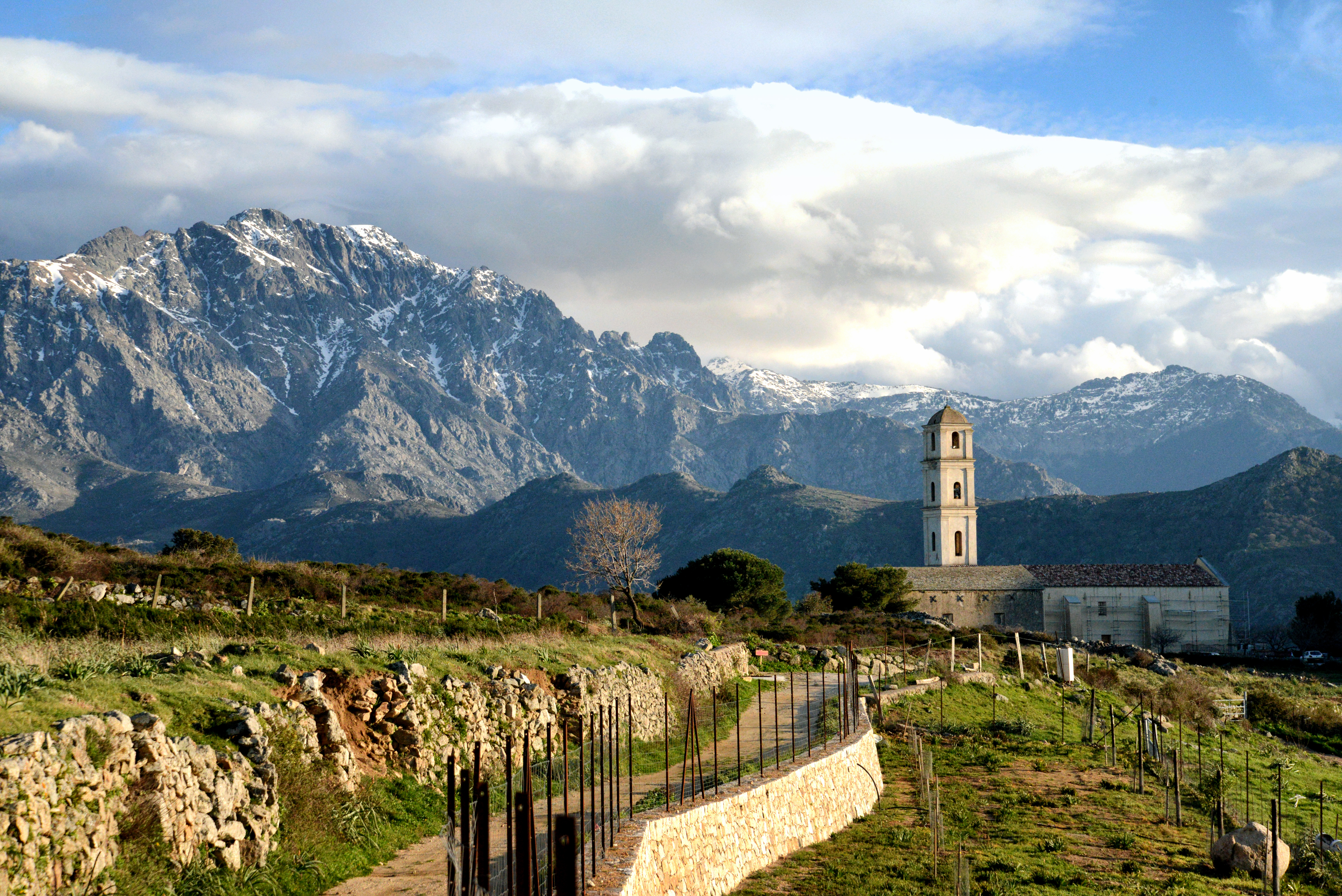 Sant'Antonino, Balagne (Corse) - Clocher de l'église de l'Annonciation (XIe s.) sur fond du Monte Grosso